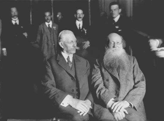 Павел Николаевич Милюков и Петр Алексеевич Кропоткин – участники Государственного совещания. Москва, 1917